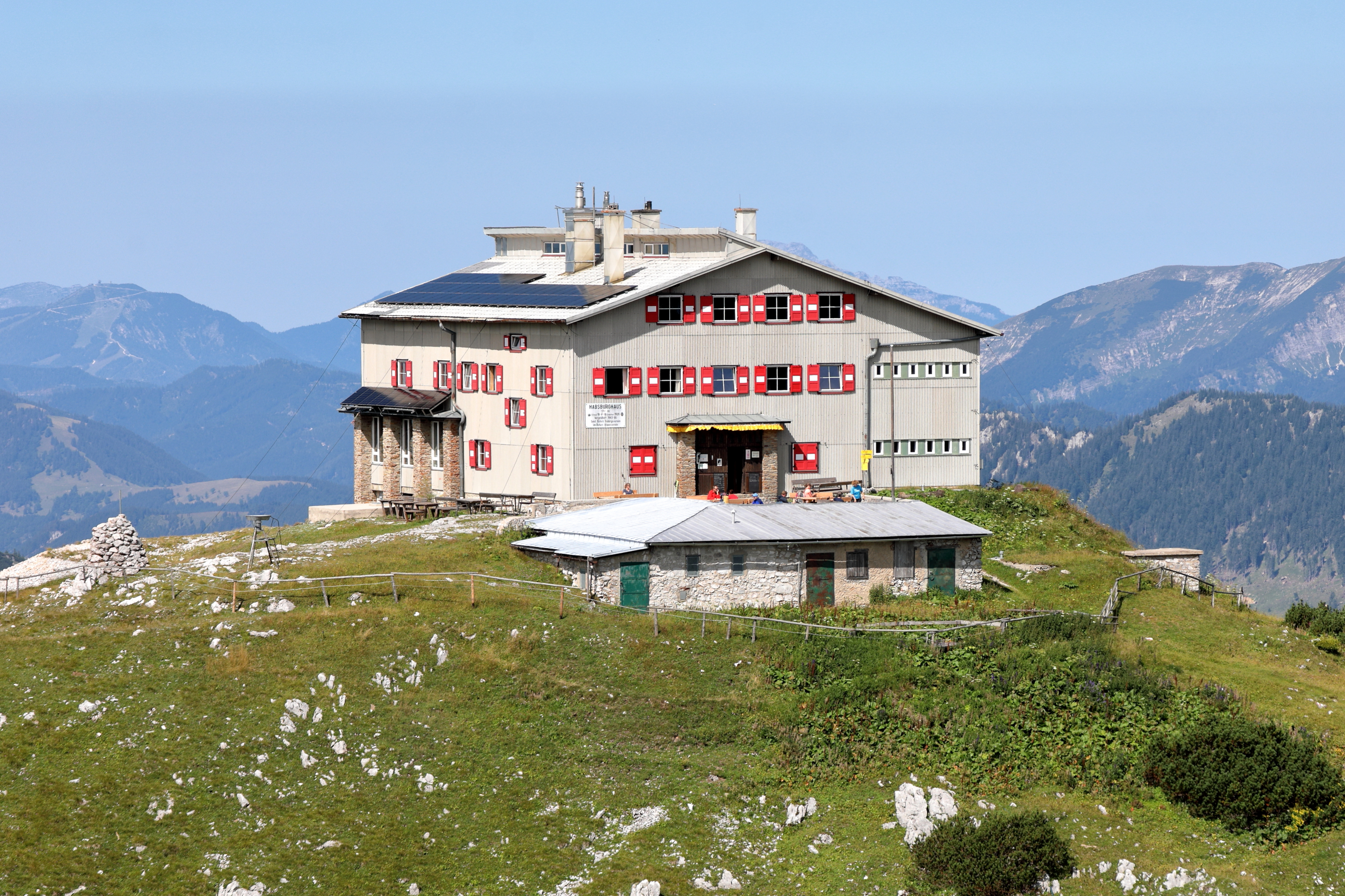 Ostsüdostansicht des Habsburghauses auf der Rax.Das Schutzhaus befindet sich auf dem Gemeindegebiet der niederösterreichischen Marktgemeinde Gemeinde Schwarzau im Gebirge und unmittelbar zur Landesgrenze der Steiermark (Gemeinde Neuberg an der Mürz). Es wurde vom Niederösterreichischen Gebirgsverein errichtet und am 24. September 1899 feierlich eingeweiht.